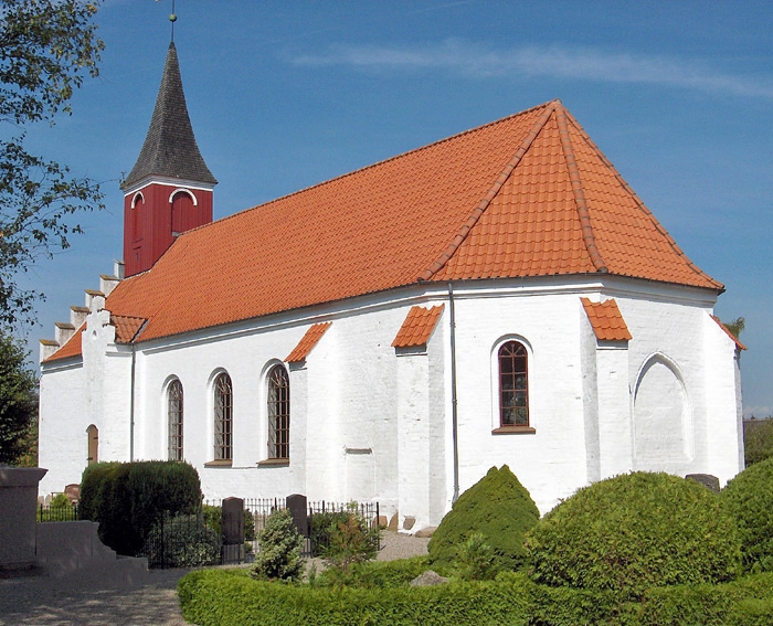 fra sydøst